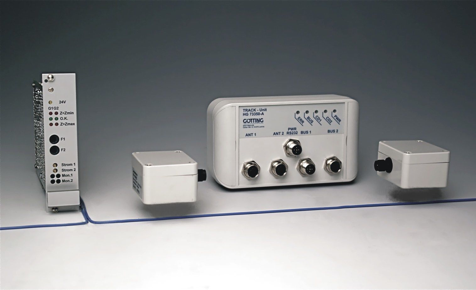 Komponenten für Leitdrahtführung (v.l.n.r.): Frequenzgenerator/Einspeisebaugruppe für zwei unterschiedliche Führungsfrequenzen, Antenne (am Fahrzeug), Auswerteeinheit für bis zu 4 Antennen, weitere Antenne